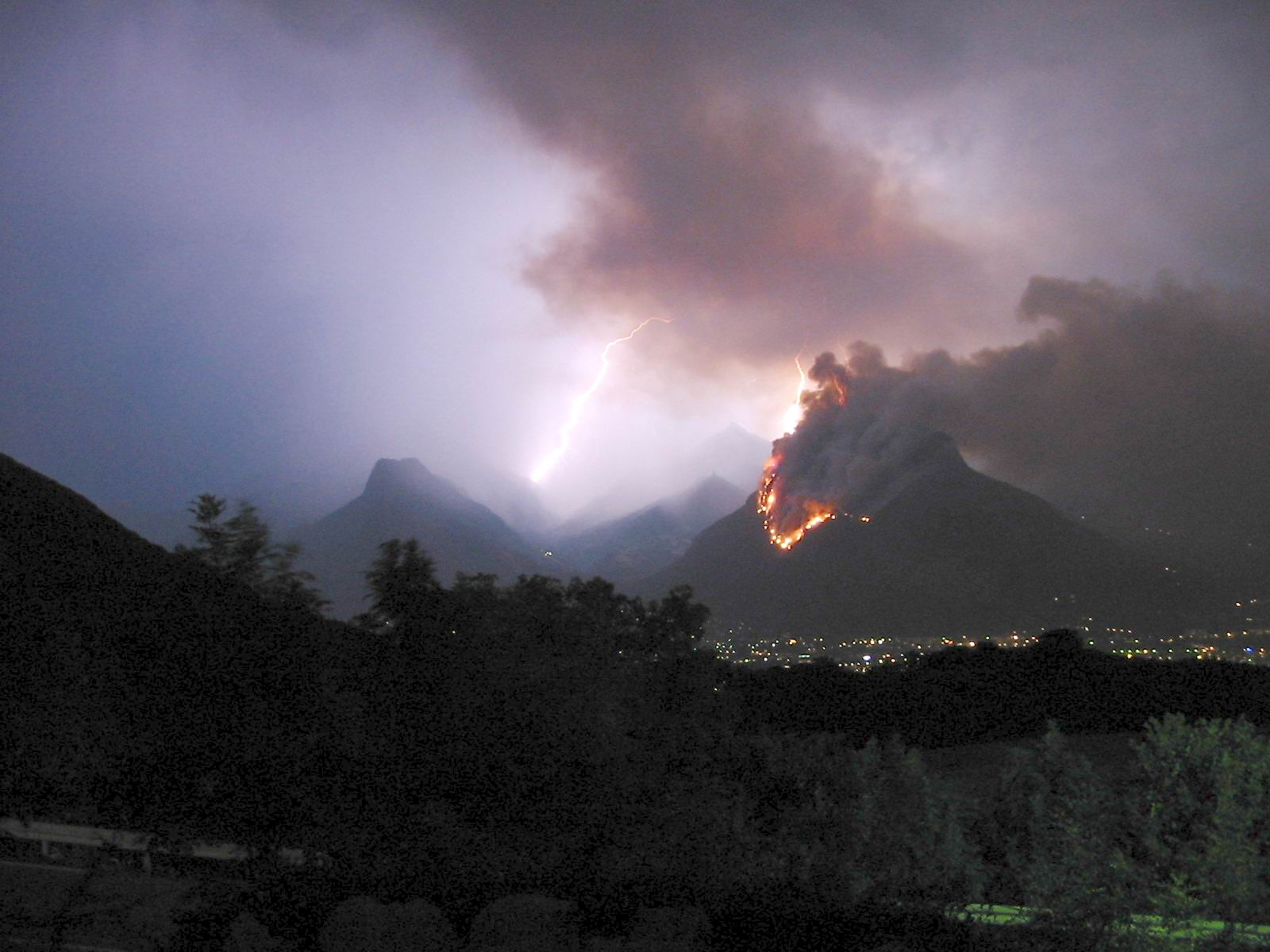 Le Néron en feu durant la canicule de 2003.